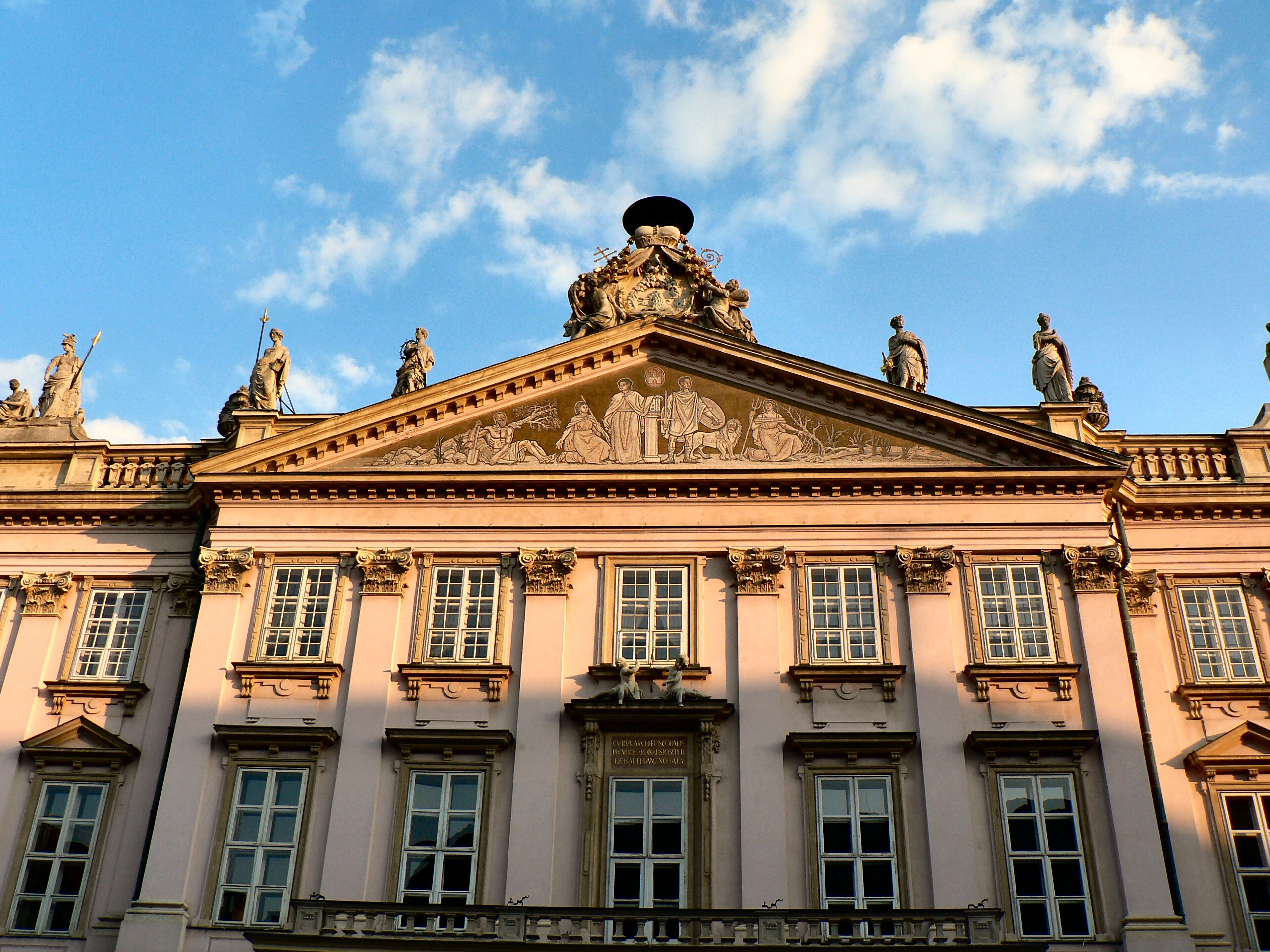 Primate's Palace, Bratislava, Slovakia